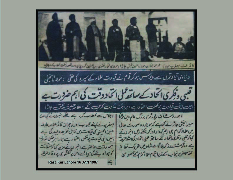 ملت جعفریہ نے اپنے محبوب اور نوجوان قائد علامہ عارف حسین الحسینی کی قیادت میں قابل فخر جدوجہد کی ہے ہمیں اپنی قیادت پر مکمل اعتماد ہے (علامہ حسین بخش جاڑا اعلی اللہ مقامہ)